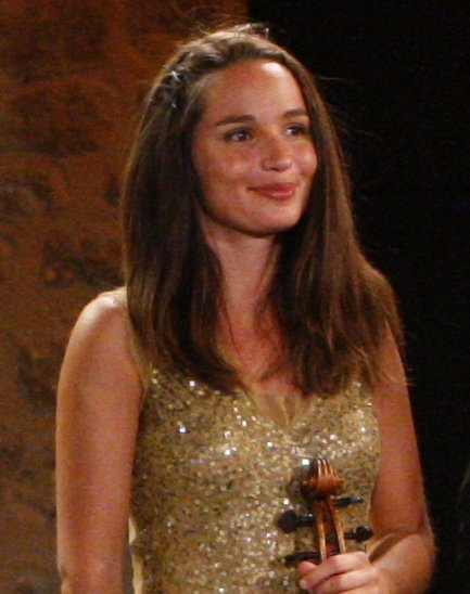 Lise Berthaud lors d'un concert du Festival International de Musique de Chambre de Provence